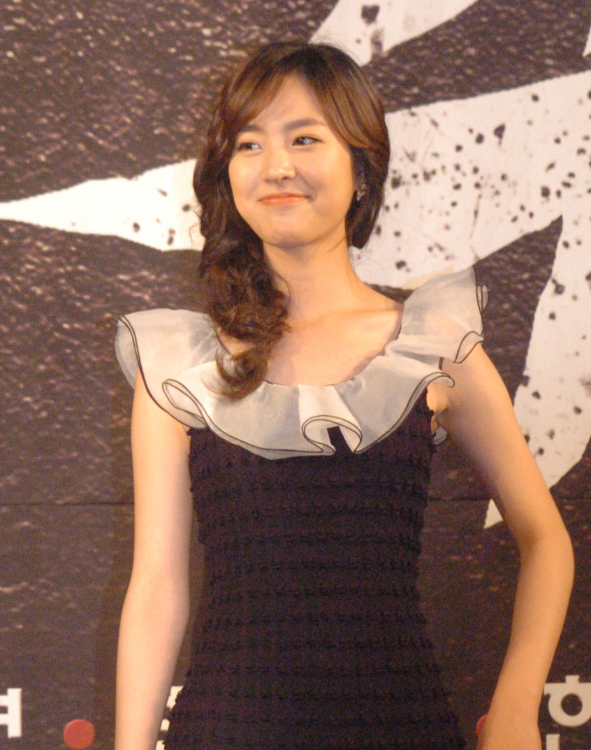 2012년 5월 23일 63컨벤션센터 주니퍼룸에서 열린 KBS2 수목드라마 《각시탈》 제작발표회에서의 진세연.